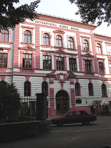 Cluj-Napoca, Universitatea Babeş-Bolyai, Facultatea de Chimie şi Inginerie Chimică, str.Arany János nr.11